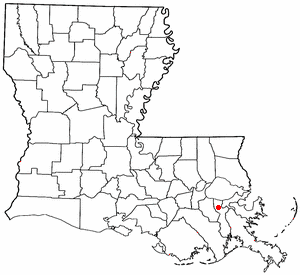 Volapük: Topam in tat: Louisiana.